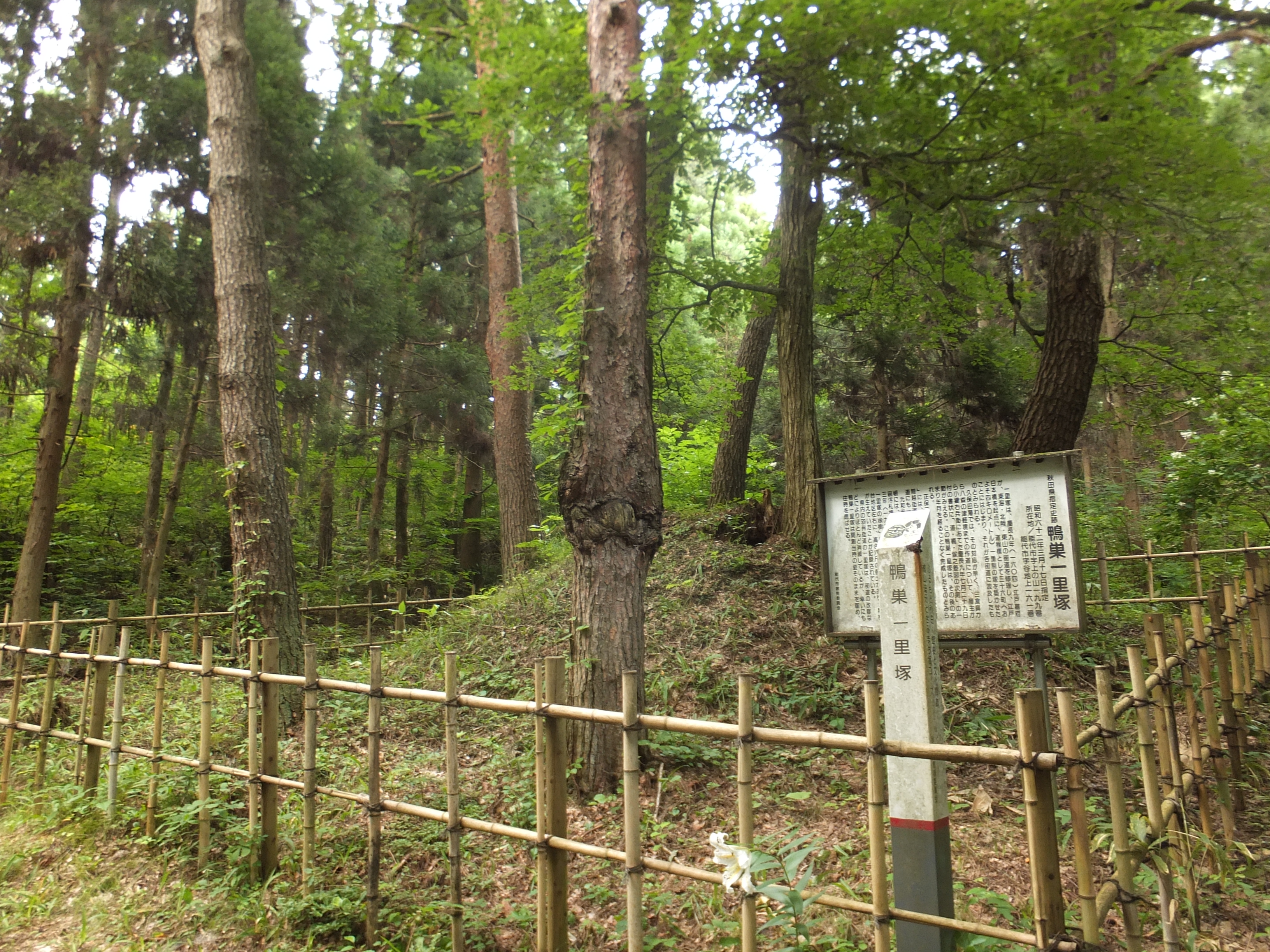 鴨巣一里塚（秋田県能代市）。旧羽州街道の一里塚である。